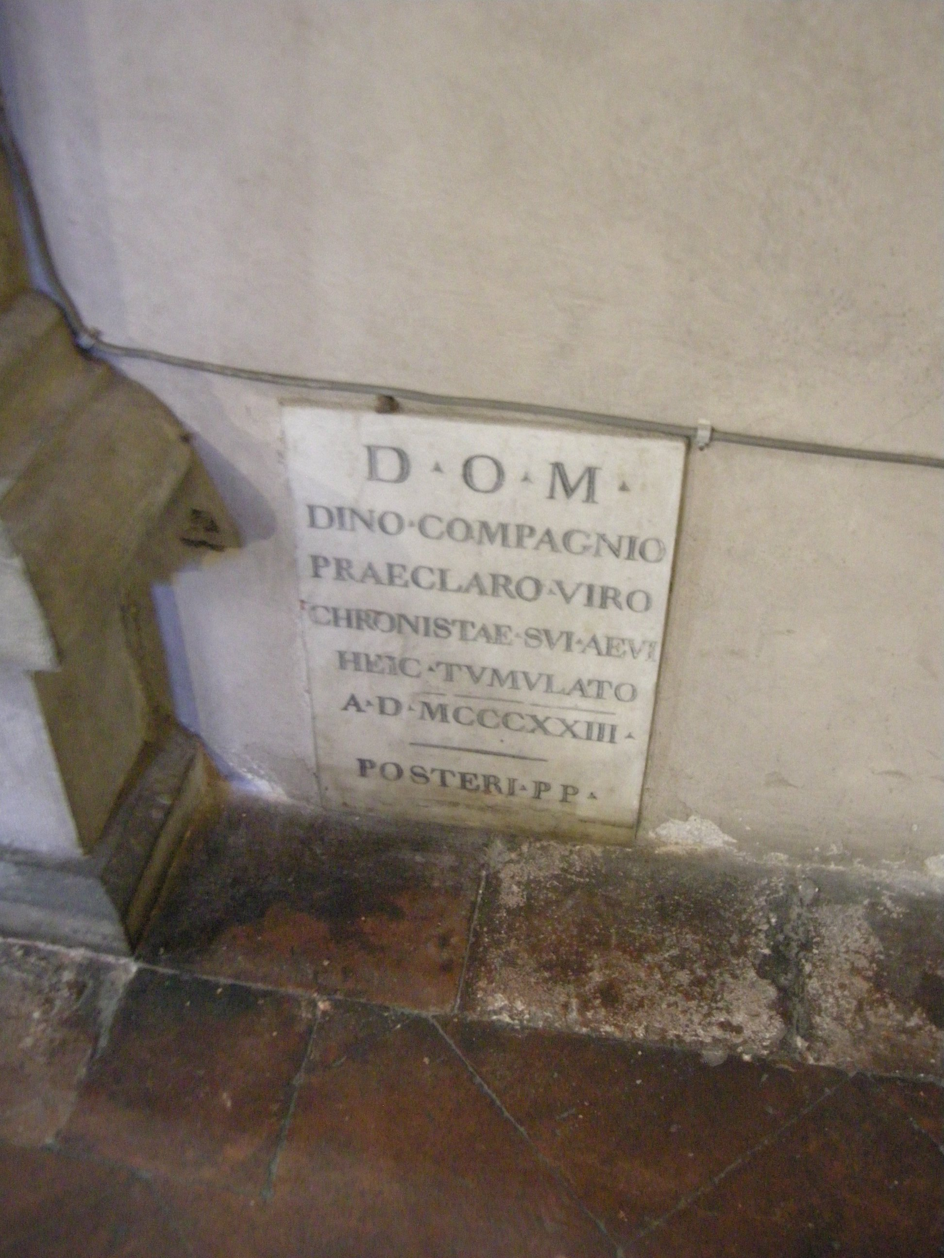 Santa trinita, lapide dino compagni